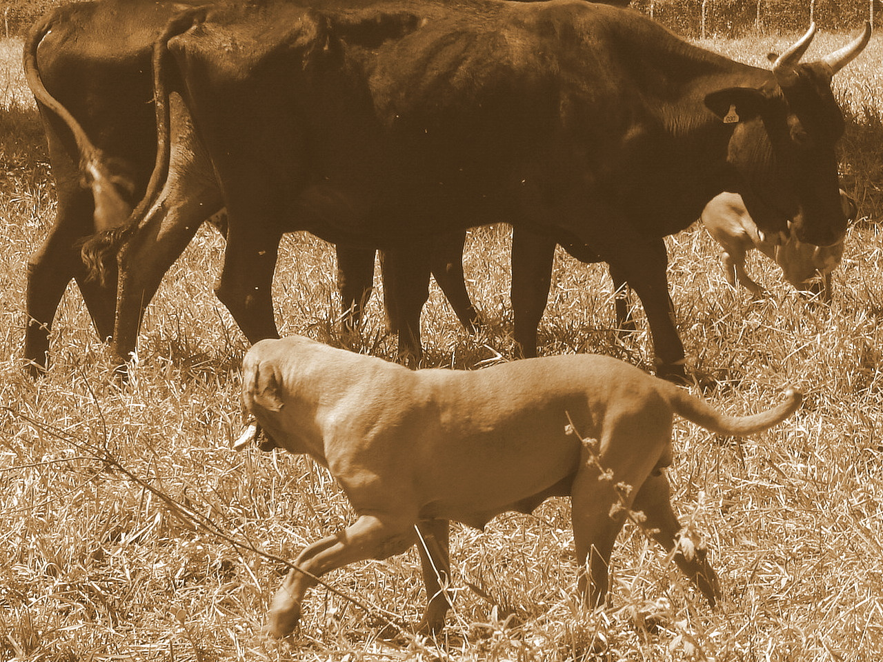 Cadela OFB (Original Fila Brasileiro) trabalhando com bois